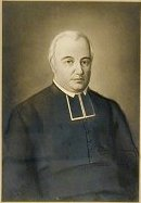 M. l'abbé Paul-Loup Archambault